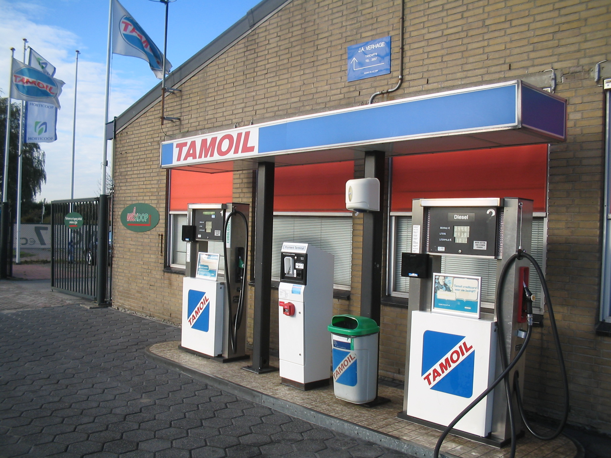 Tamoil gazstation, Pijnacker, 8 november 2005